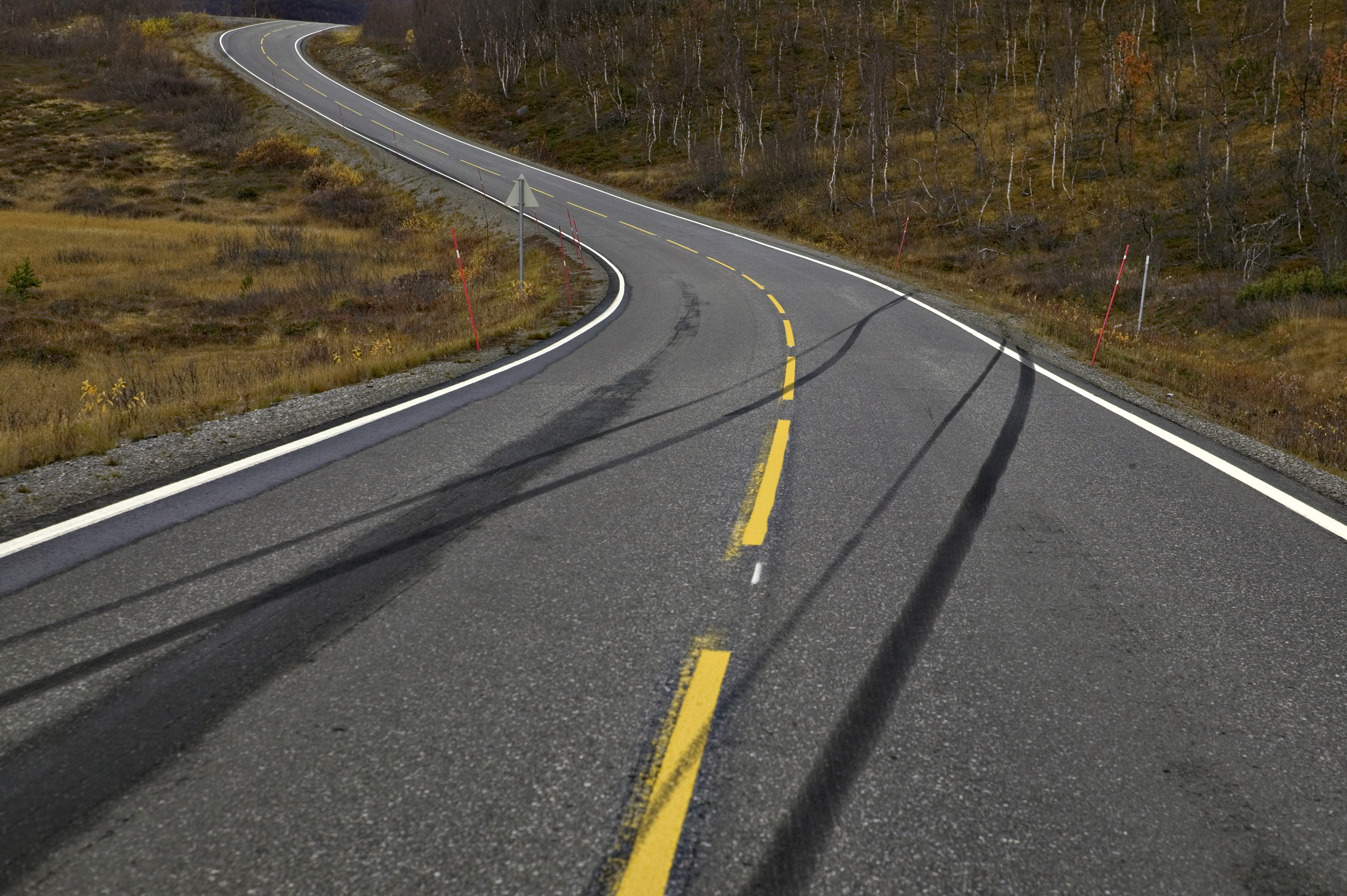 Bilvei Keywords: Landscape, Transport, Norway